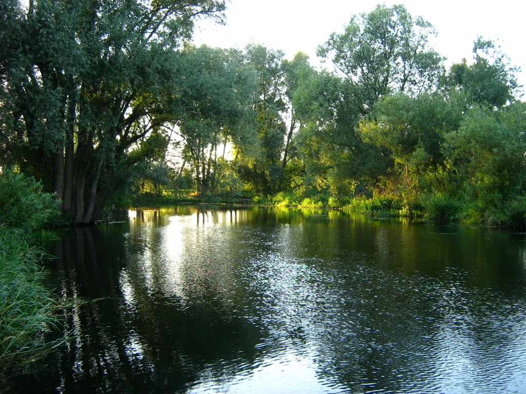 Die Tollense bei Demmin (Vorpommern).